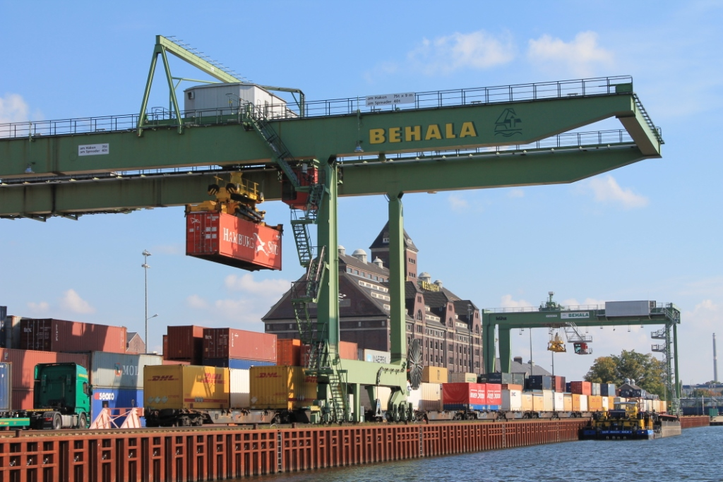 Containerumschlag bei der BEHALA